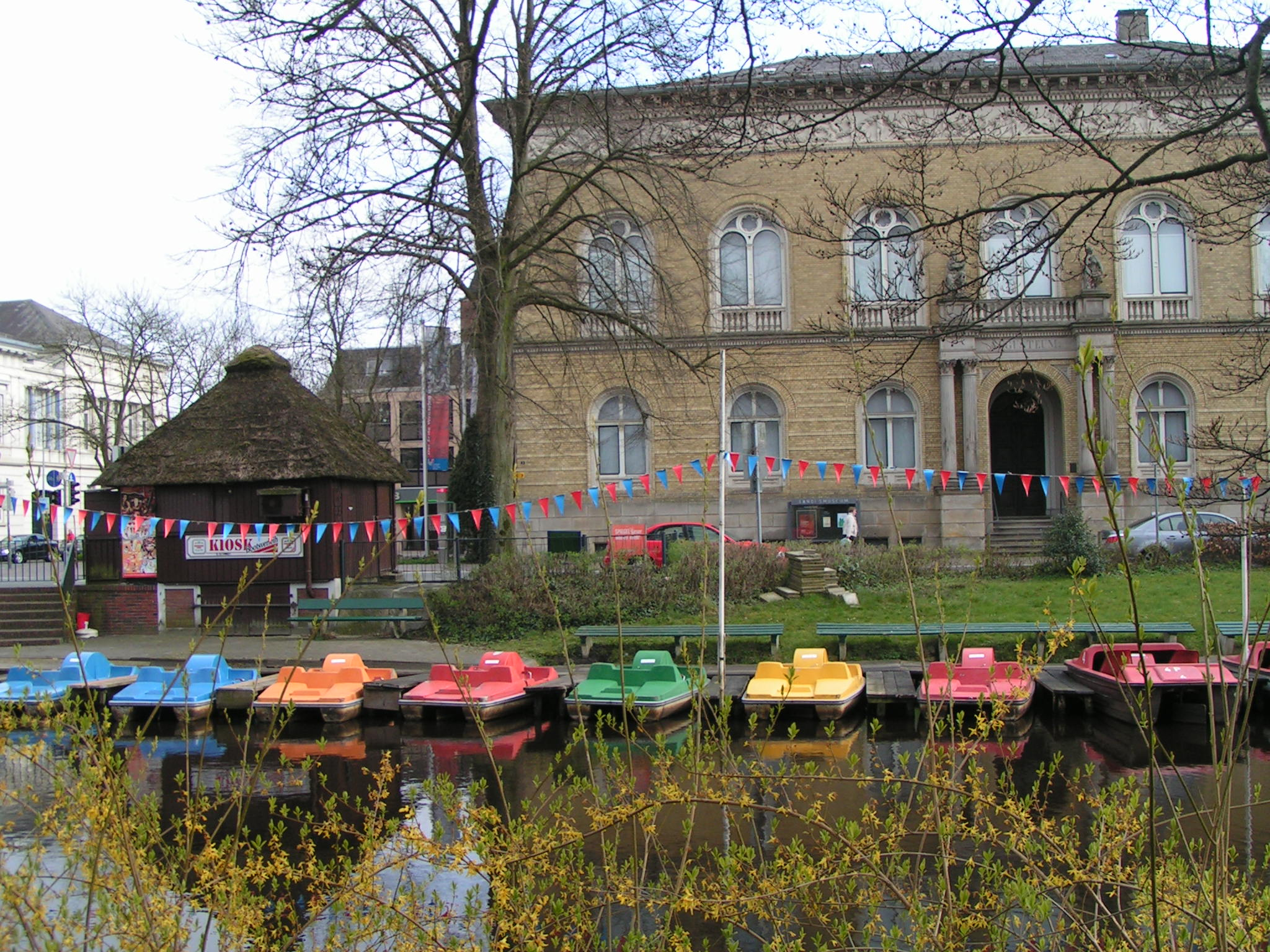 Boote auf der Mühlenhunte in Oldenburg. Im Hintergrund das Augusteum